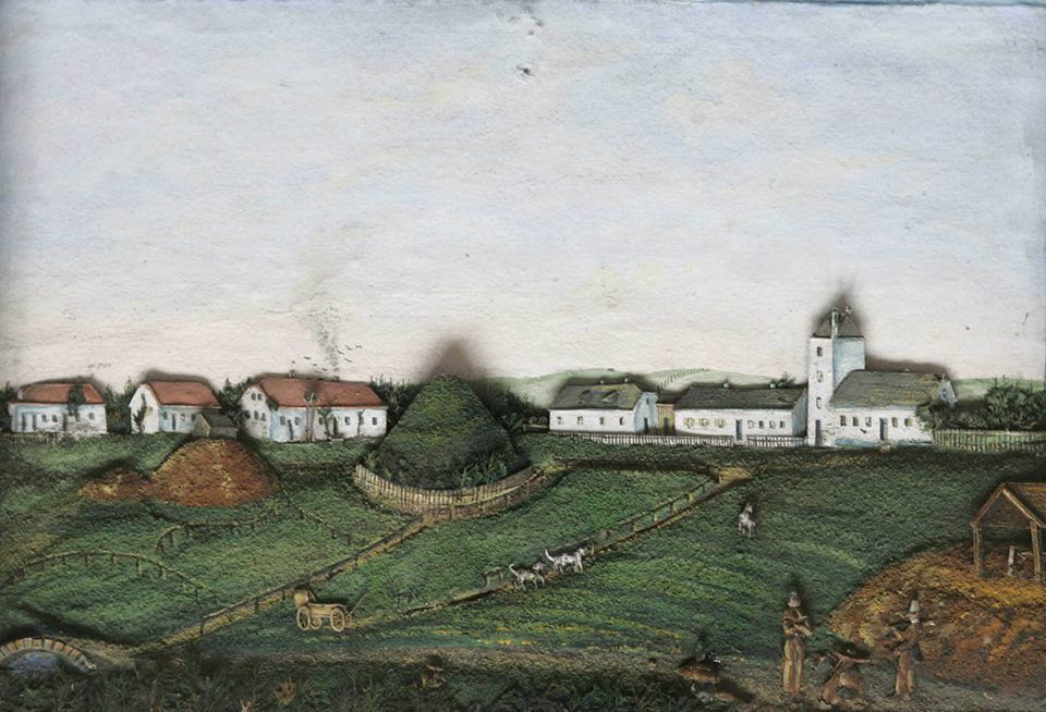 Diorama pokazująca południową część miasta Tarnowskie Góry z Królewską Kopalnią "Fryderyk" nieznanego autorstwa z l. 1860-1870